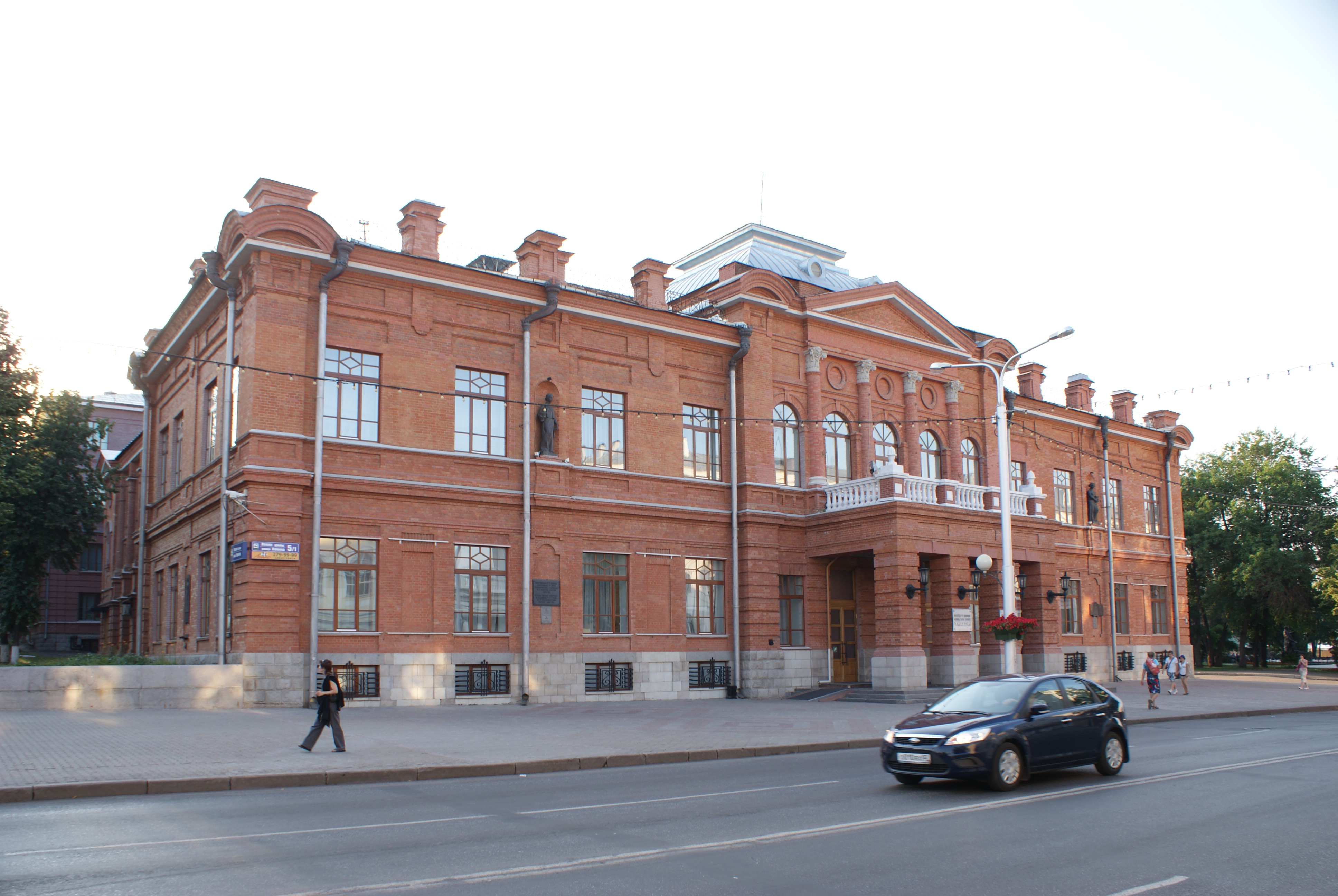 Народный дом С.Т. Аксакова: улица Ленина, 5а / улица Пушкина, Уфа, Башкортостан